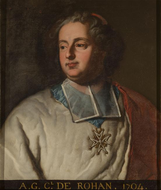 grand aumônier de France, membre du conseil de Régence en 1722. Il porte la croix de l'ordre du Saint-Esprit